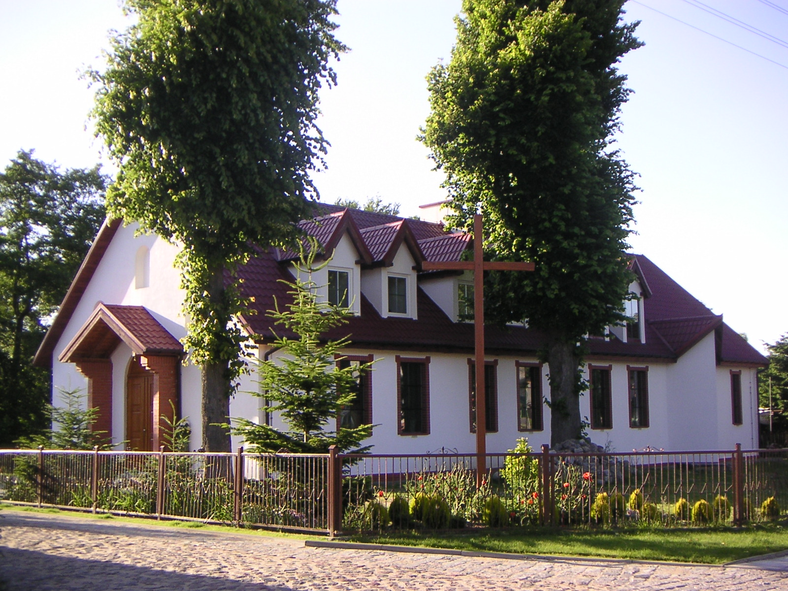 Szczecin Śmierdnica, ul. Nauczycielska - rzymskokatolicki kościół filialny p.w. NMP Matki Kościoła